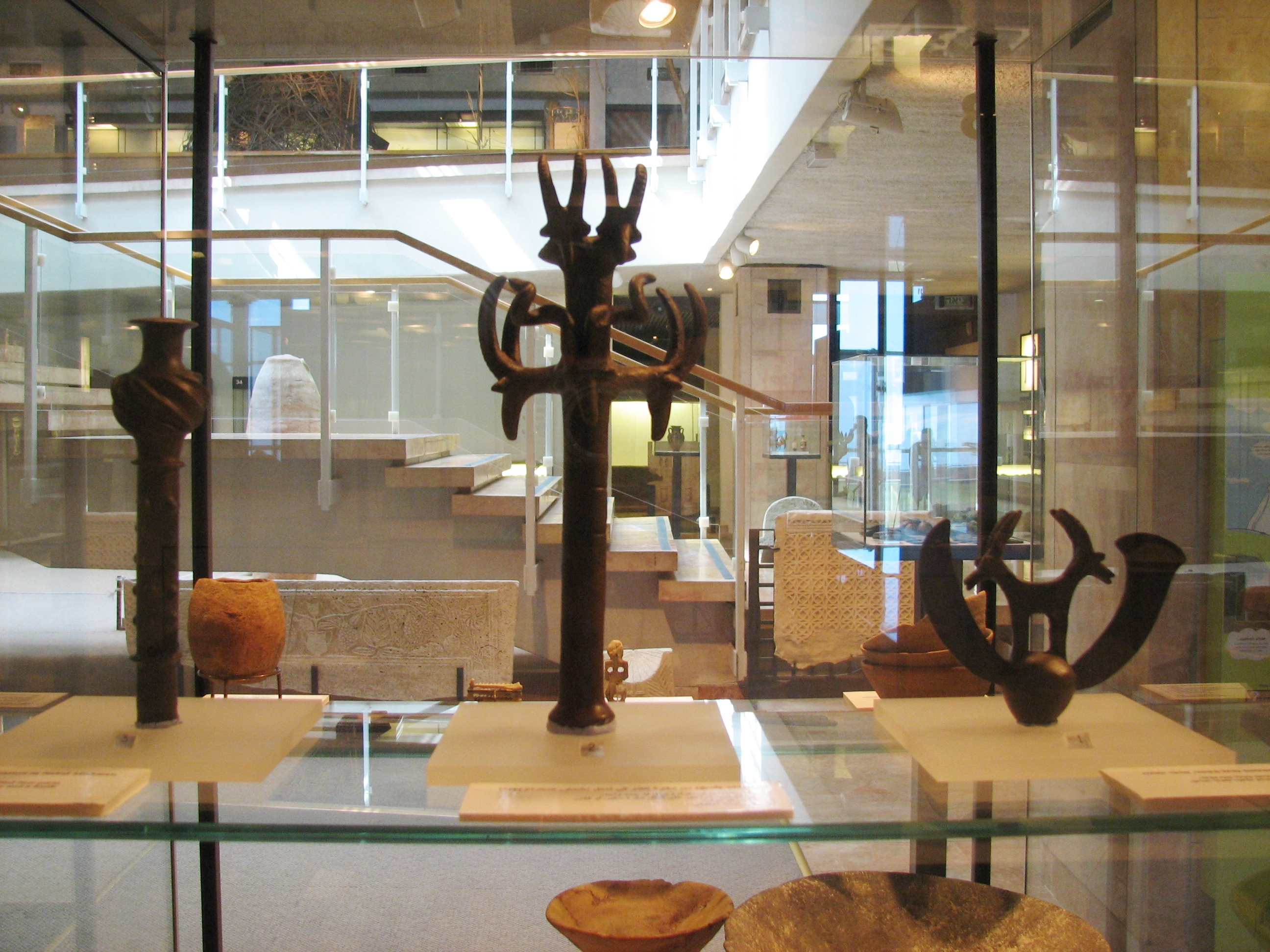 Treasure of Nahal Mishmar is a hoard of Chalcolithic artifacts discovered in a cave on the northern side of Nahal Mishmar. The hoard included 432 copper, bronze, ivory and stone decorated objects; 240 mace heads, about 100 scepters, 5 crowns, powder horns, tools and weapons מטמון נחל משמר התגלה בשנת 1961 במערה בנחל משמר במדבר יהודה בעקבות מבצע חיפוש של מגילות גנוזות. נמצאו ממצאים מהתקופה הכלקוליתית שכללו 442 חפצים, מהם 429 מנחושת, ובהם שרביטים וכלי שנהב, שישה חפצים מהמטיט, אחד מאבן, חמישה מניב של היפופוטם ואחד מחט של פיל. כלים מנחושת מימין נס מעוטר ביעלים, במרכז שרביט יעלים מנחושת. משמאל קנה. מוזיאון הכט חיפה. העתקים